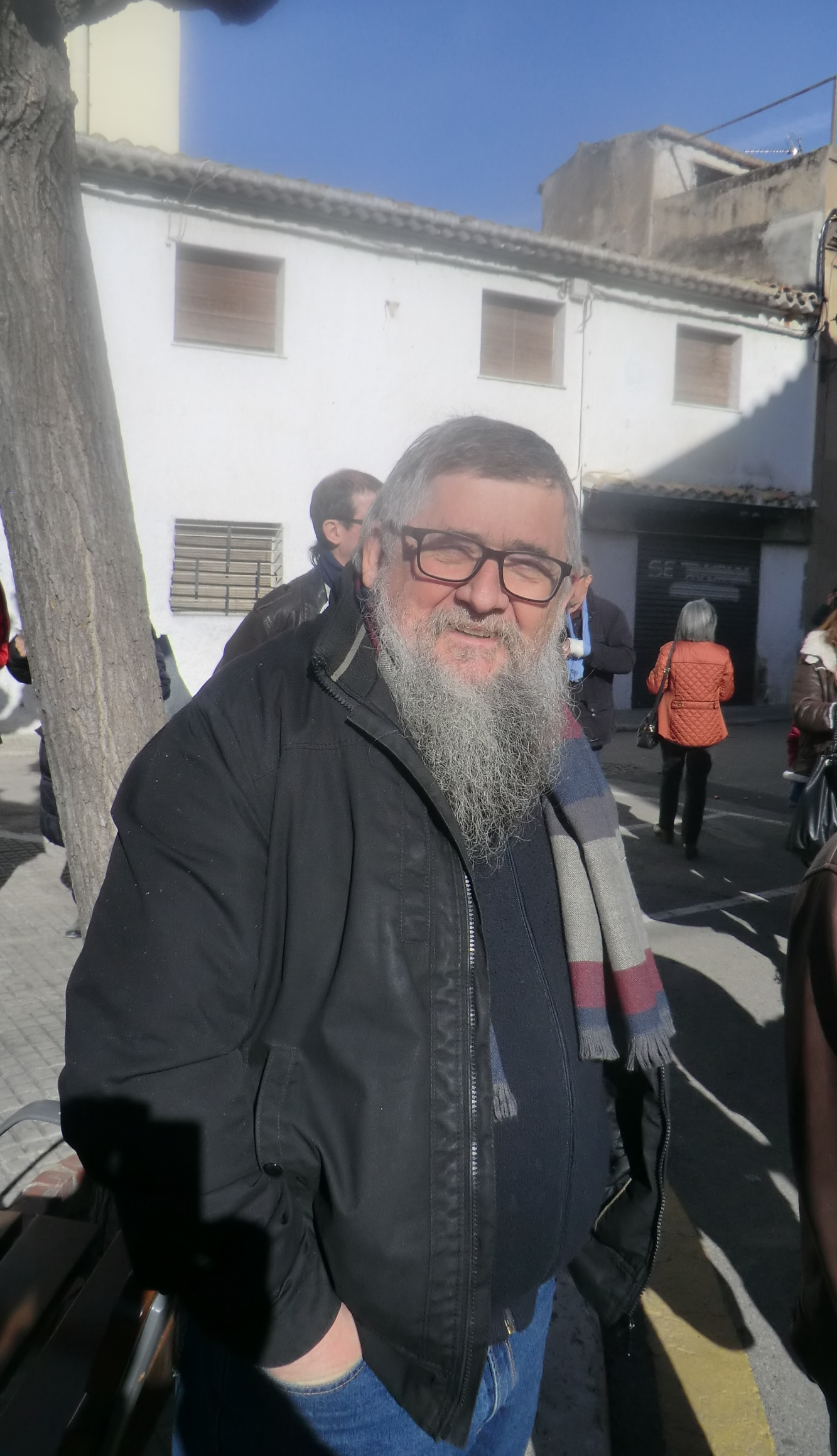 Joan Garriga, Nana. Polític d'UM-9 i la CUP